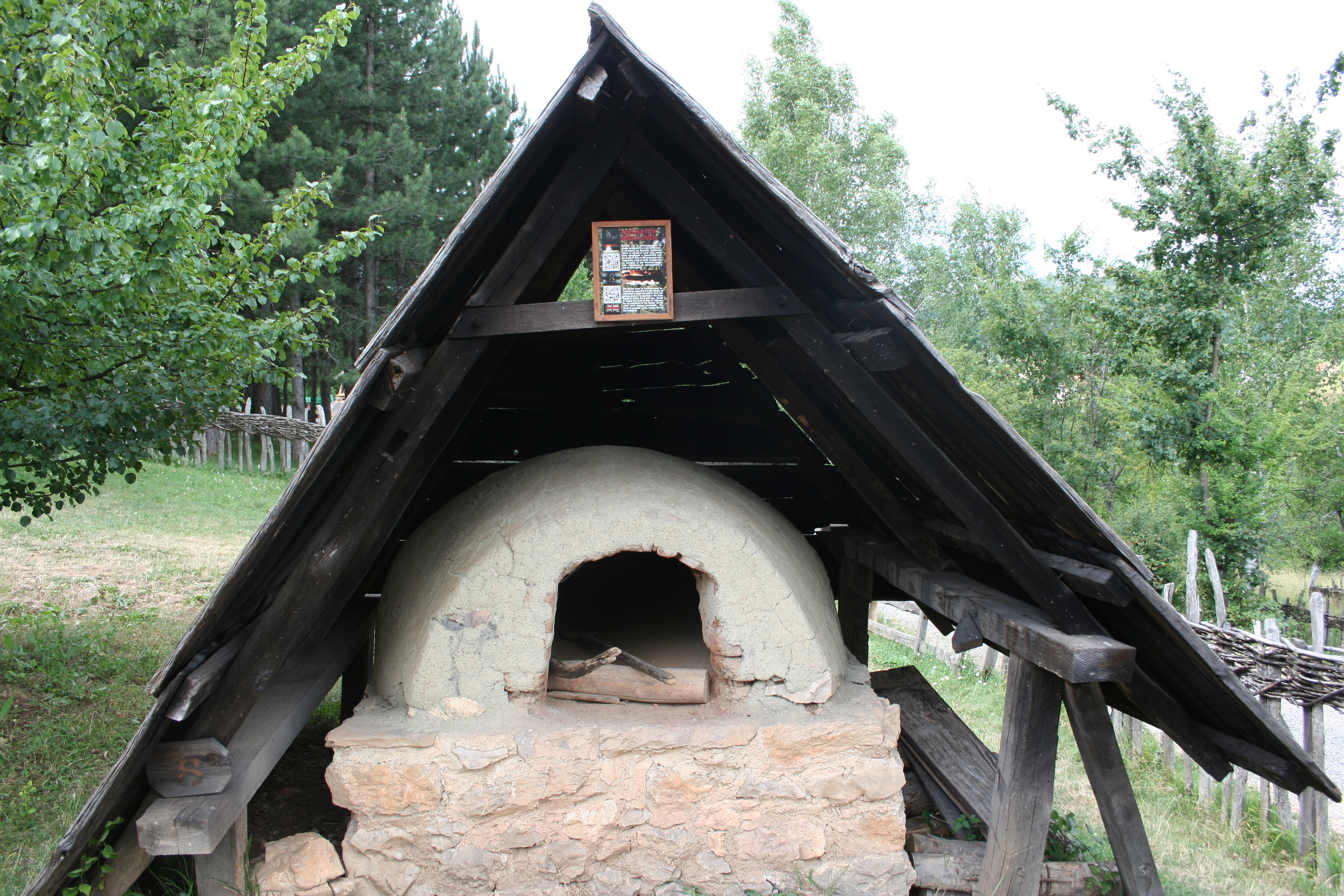 Muzej na otvorenom "Staro selo" Sirogojno